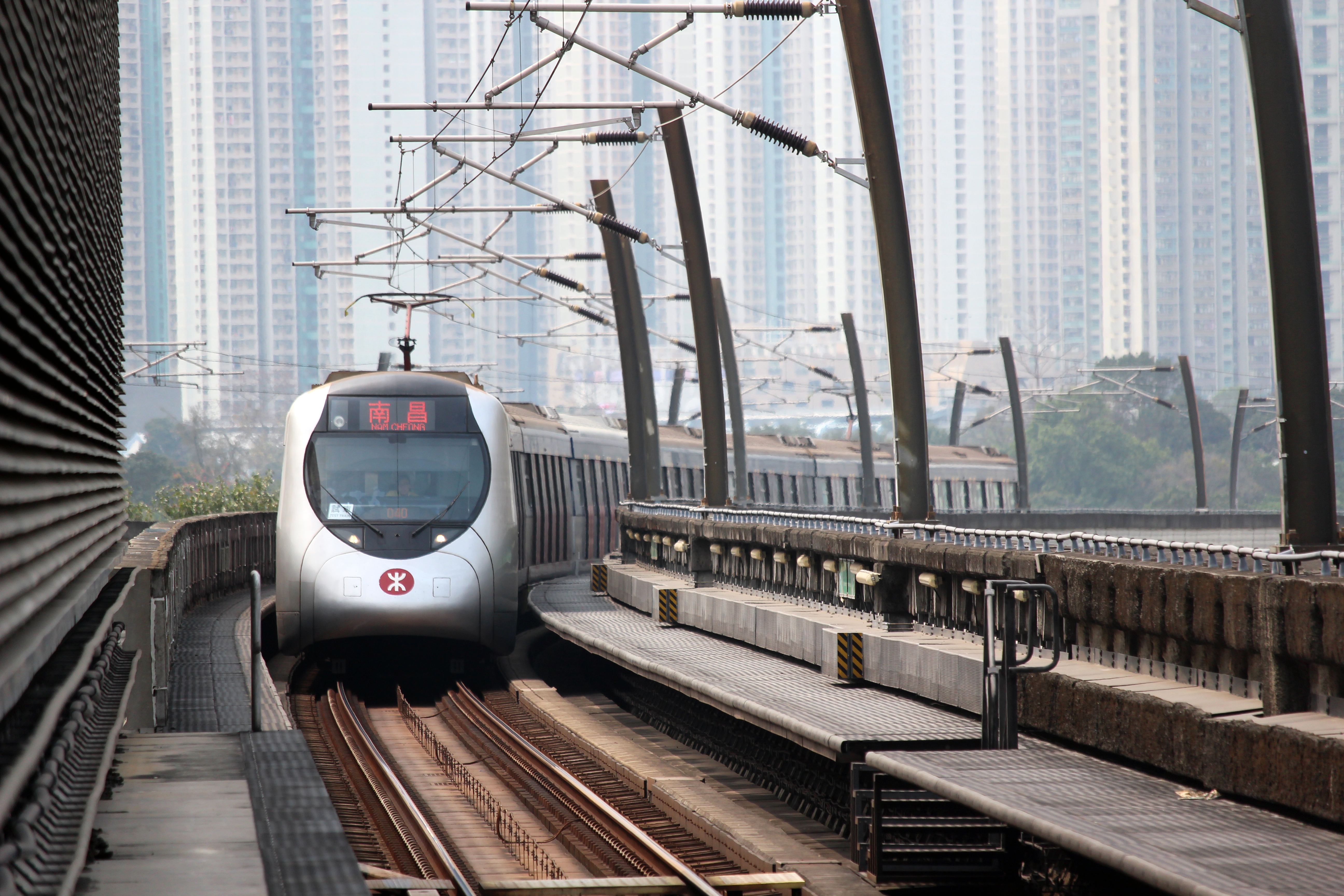 西鐵綫8卡列車(325/326)正進行測試（拍攝於朗屏站）